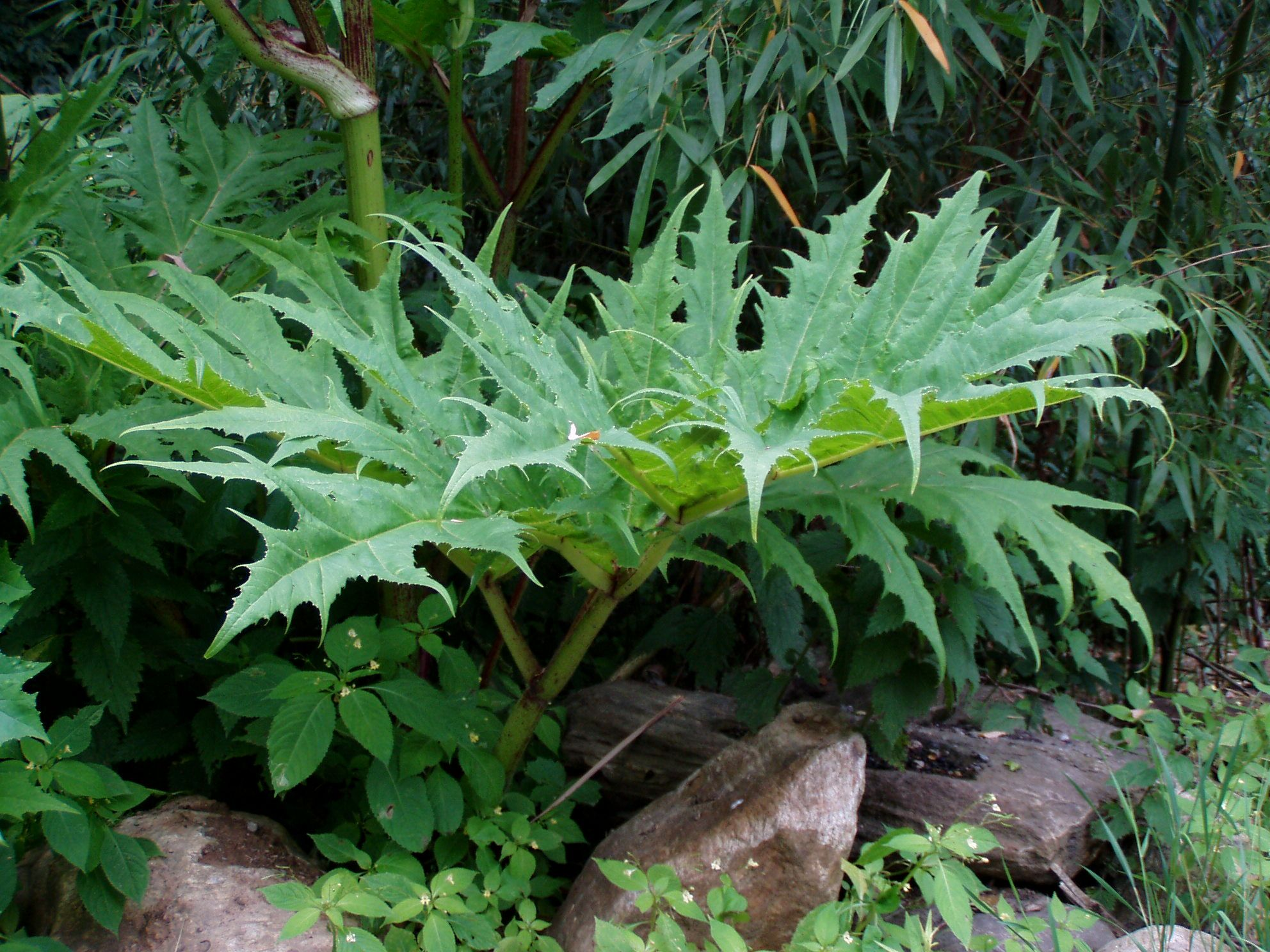 Leaf of Heracleum mantegazzianum, Kitzeck im Sausal, Styria, Austria